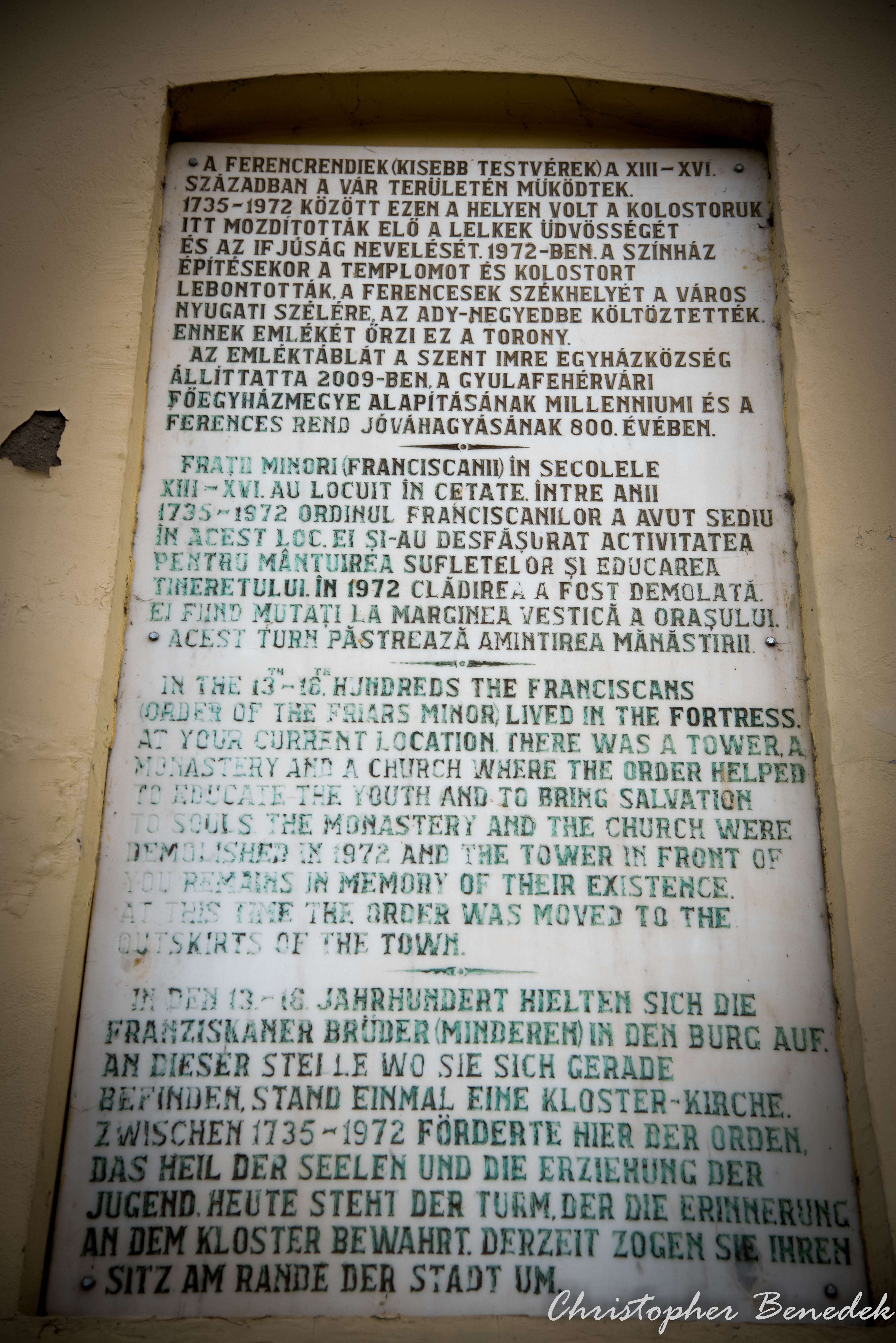 A torony oldalán látható többnyelvű felirat